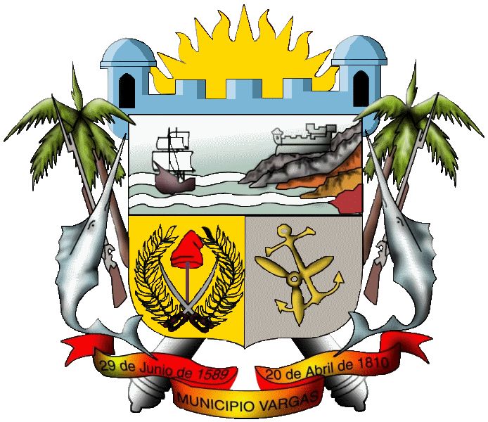 Escudo del municipio Vargas, estado Vargas, Venezuela. El municipio Vargas es el único municipio del estado Vargas con el cual comparte el territorio, pero del que se encarga en otro nivel. Tiene su propio escudo diferente del estadal, el cual tiene en su cuartel superior una nave llegando a la costa por el Puerto de La Guaira, en el cuartel inferior derecho un gorro frigio entre laureles de oro, representando la lucha de Vargas por la independencia, como Gual y España los precursores, en el cuartel inferior izquierdo un ancla, que representa la vocación marítima ya que todas las parroquias del municipio tienen costa y muchas tienen muelles, lo soportan peces espada, fusiles y palmeras, por arriba tiene un castillo y un sol amaneciendo, debajo tiene 2 cañones y 2 fechas 20 de julio de 1589 fundación de la Guaira, y 20 de abril de 1810 fecha en la que sale por la Guaira el último gobernante español Vicente Emparam, y debajo dice Municipio Vargas